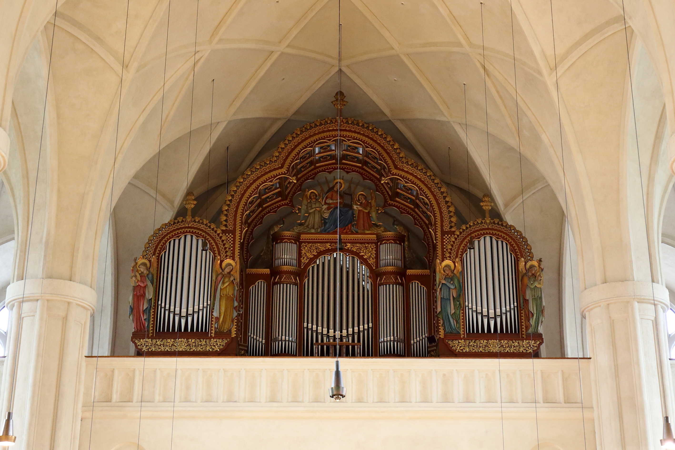 Die Orgel der Donaufelder Pfarrkirche im 21. Wiener Gemeindebezirk Floridsdorf. Die Orgel mt insgesamt 1.940 Pfeifen stammt aus dem Jahr 1910 und wurde von der Orgelbaufirma Franz Josef Swoboda gefertigt.